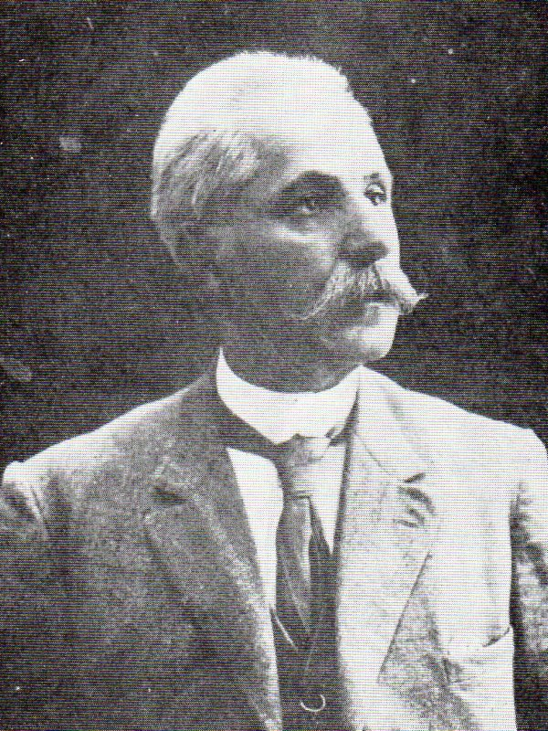 immagine da me tratta da copia in mio possesso di: Vittorio D'Anelli, Histonium ed il Vasto, Vasto, Renato Cannarsa, 1988, p. 93, OCLC 955660320, SBN IT\ICCU\TER\0030911.